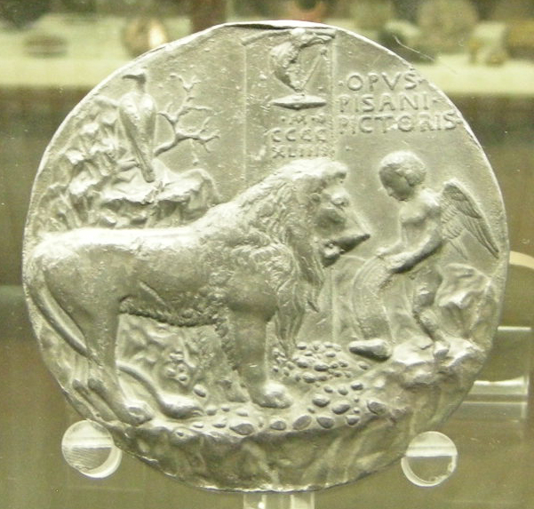 CdM, pisanello, medaglia di leonello d'este 1444 verso